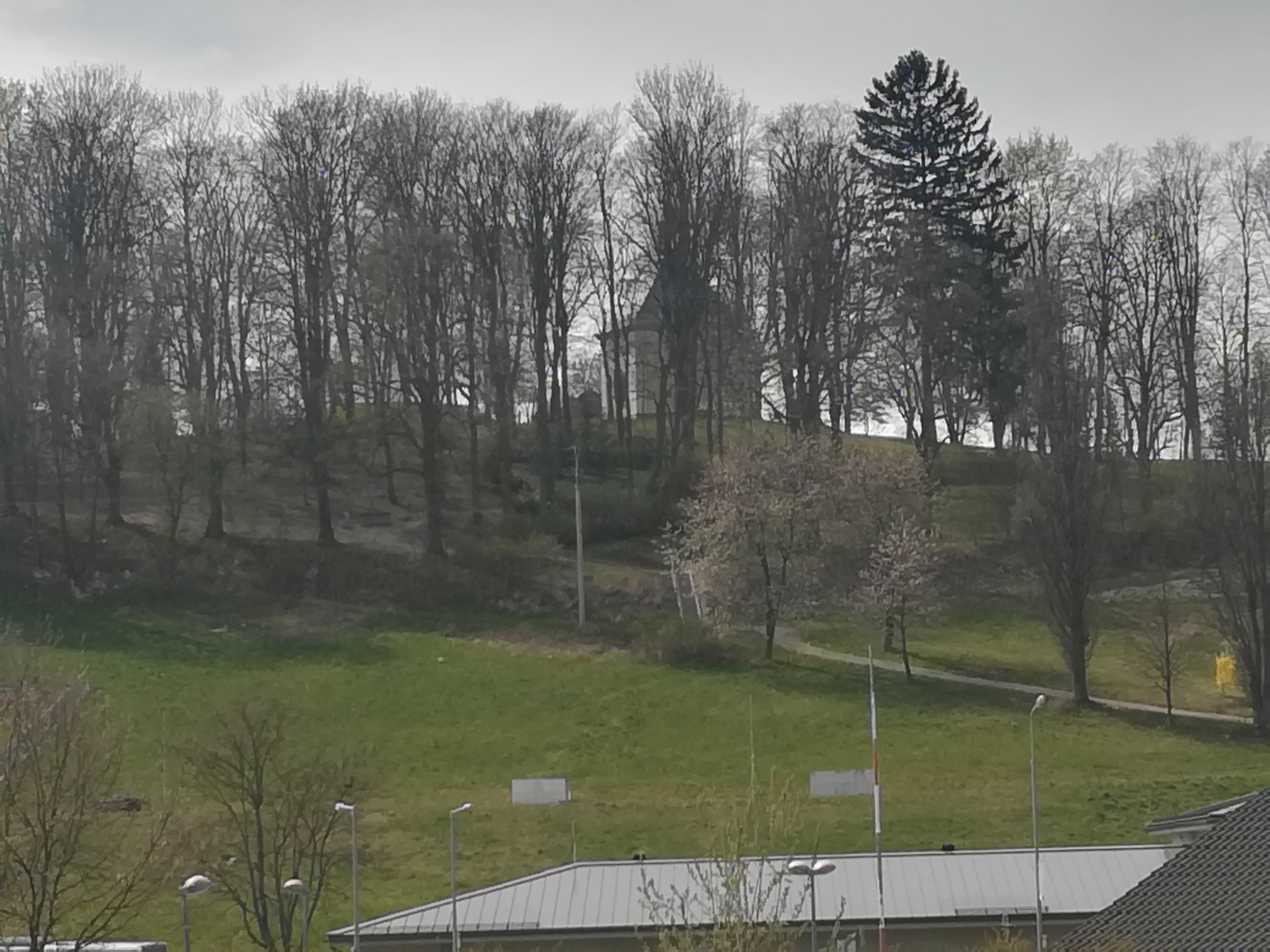 Rozálka hill in Žamberk